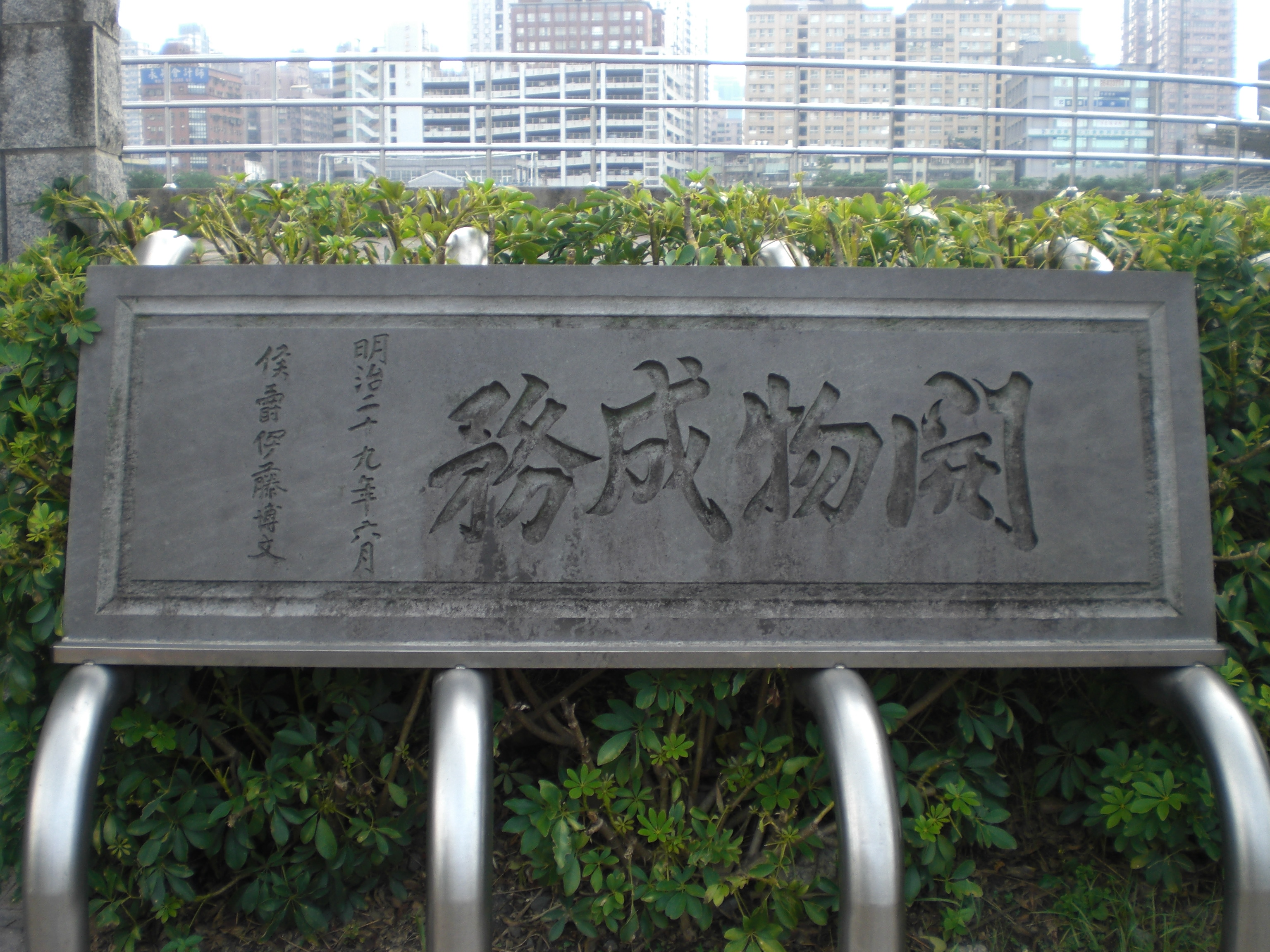 伊藤博文為樟樹灣隧道題字的「開物成務」石碑是伊藤博文在臺灣唯一墨寶，現位於新北市汐止區秀峰路汐止區綜合運動場旁。